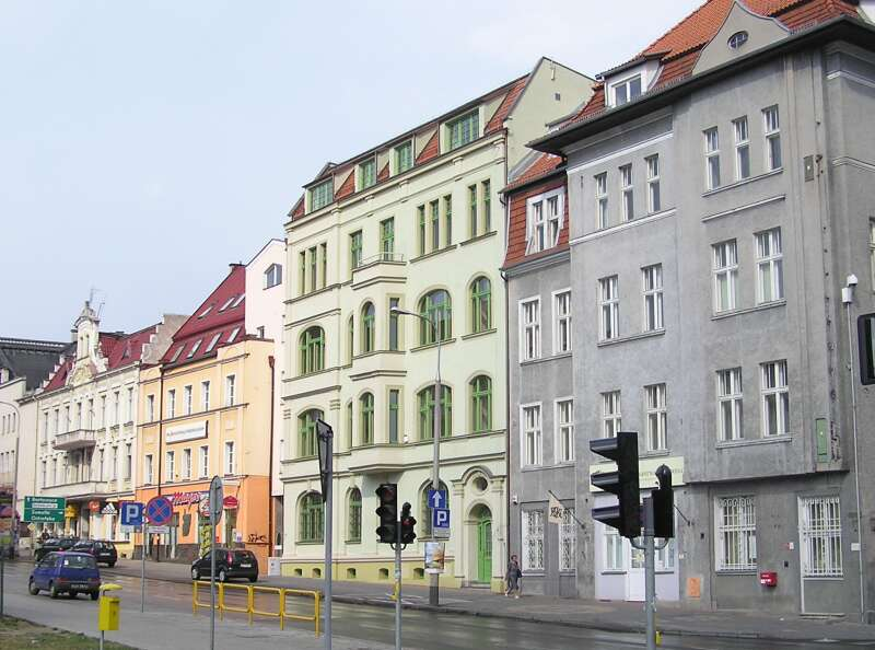 Olsztyn - ul. Pieniężnego